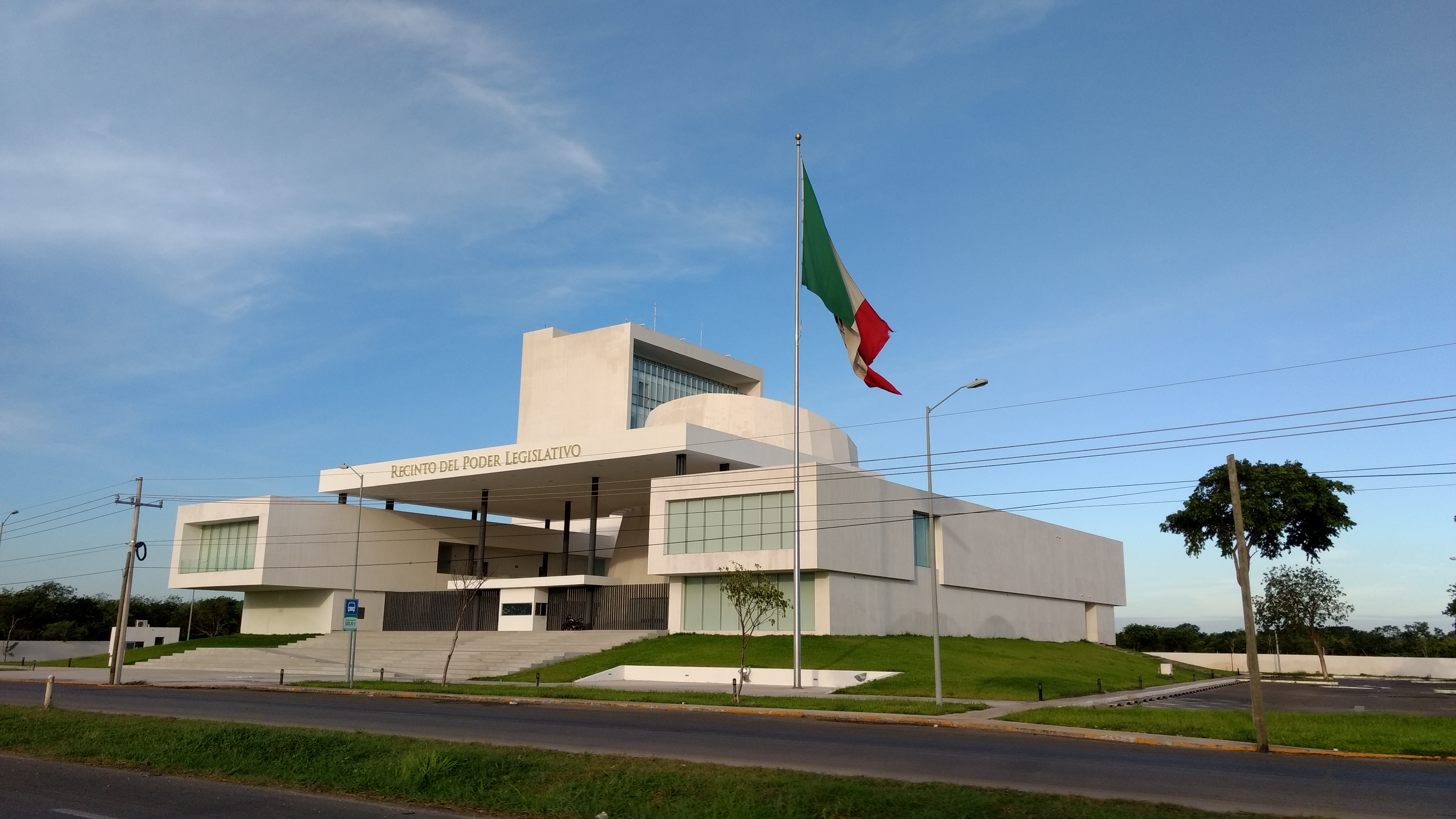 Recinto del Poder Legislativo del Honorable Congreso del Estado de Yucatán, sede del poder legislativo estatal.